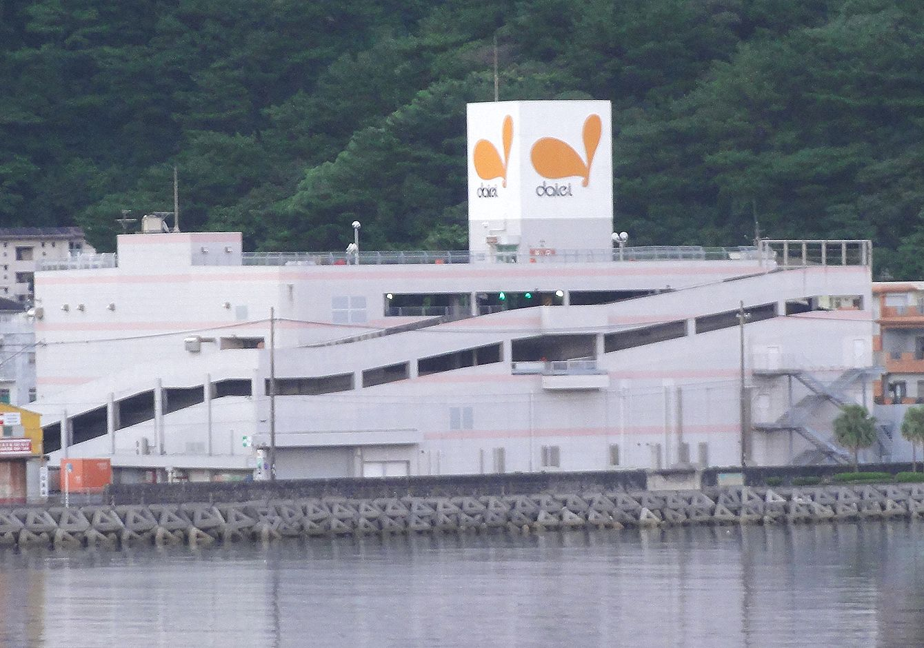 ダイエープラザ大島店